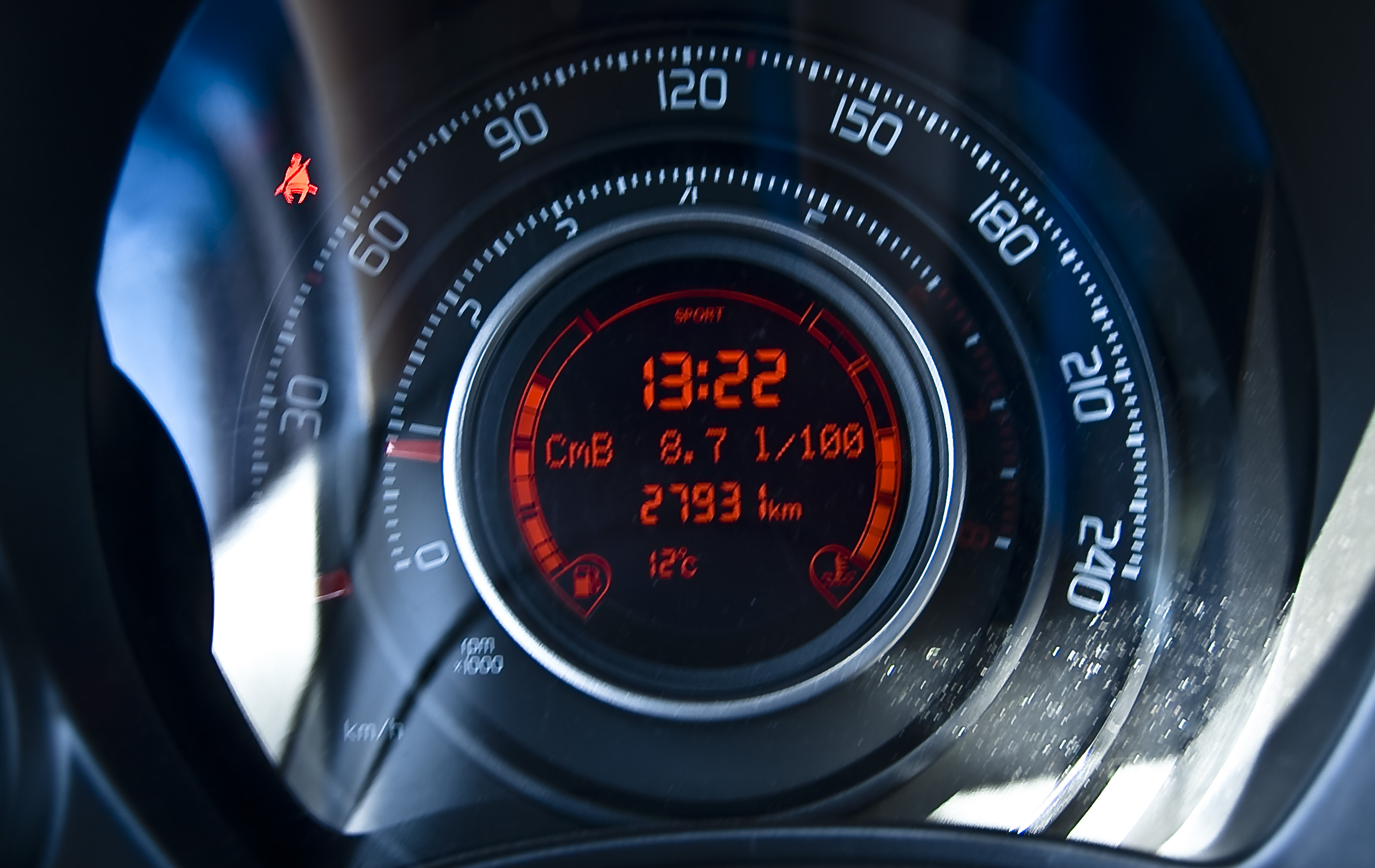 Prueba del Abarth 500 y photoshoot para Diariomotor